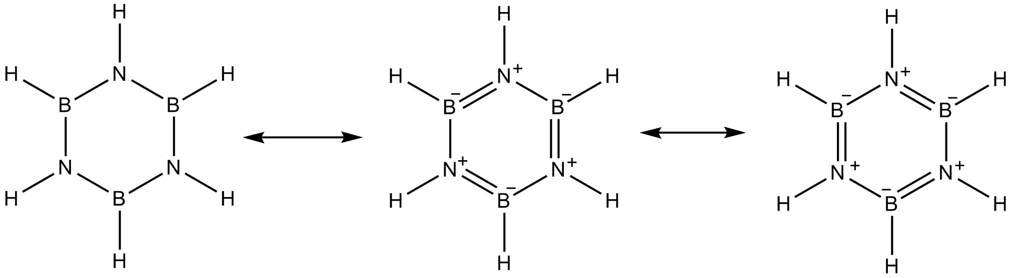 Borazin Mesomers